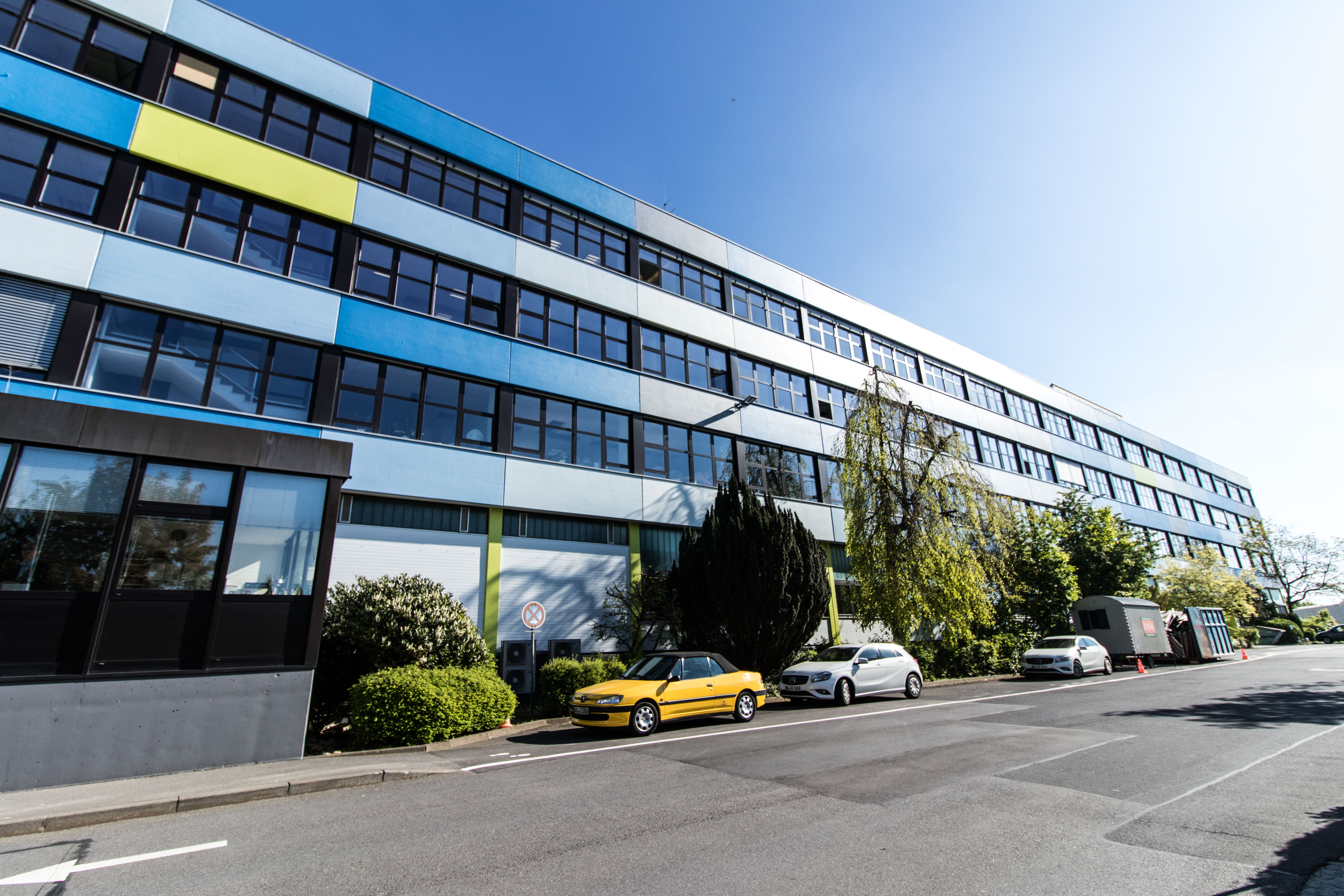 Das Hauptgebäude der Main-Post im Würzburger Stadtteil Heuchelhof.